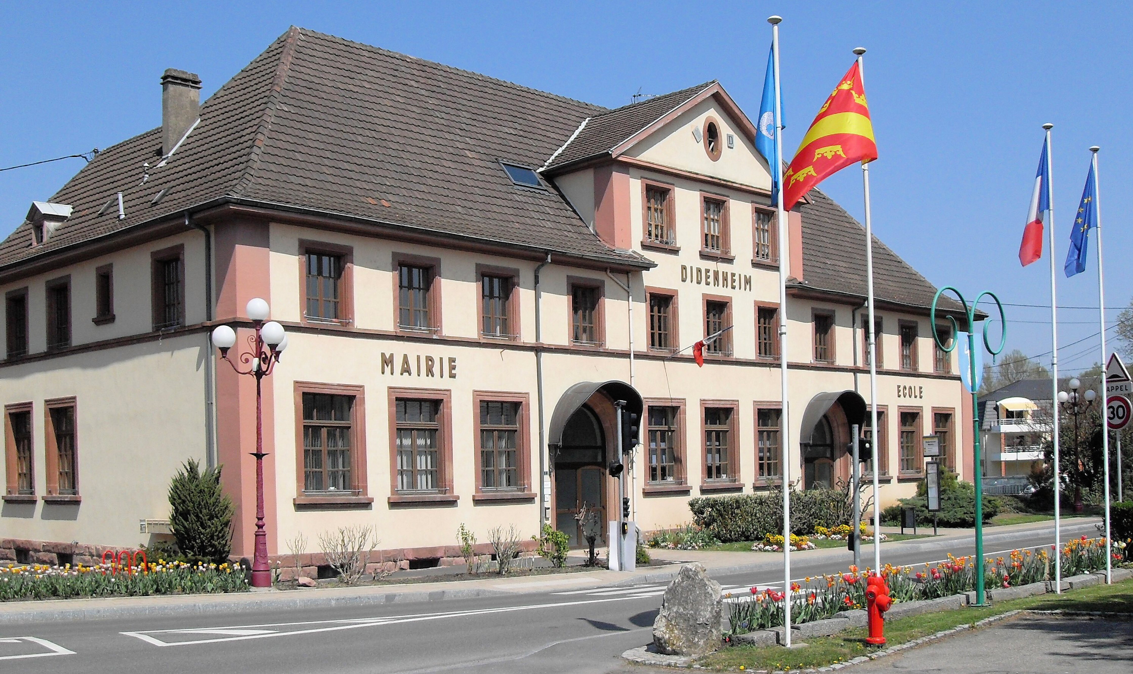 La mairie-école de Didenheim